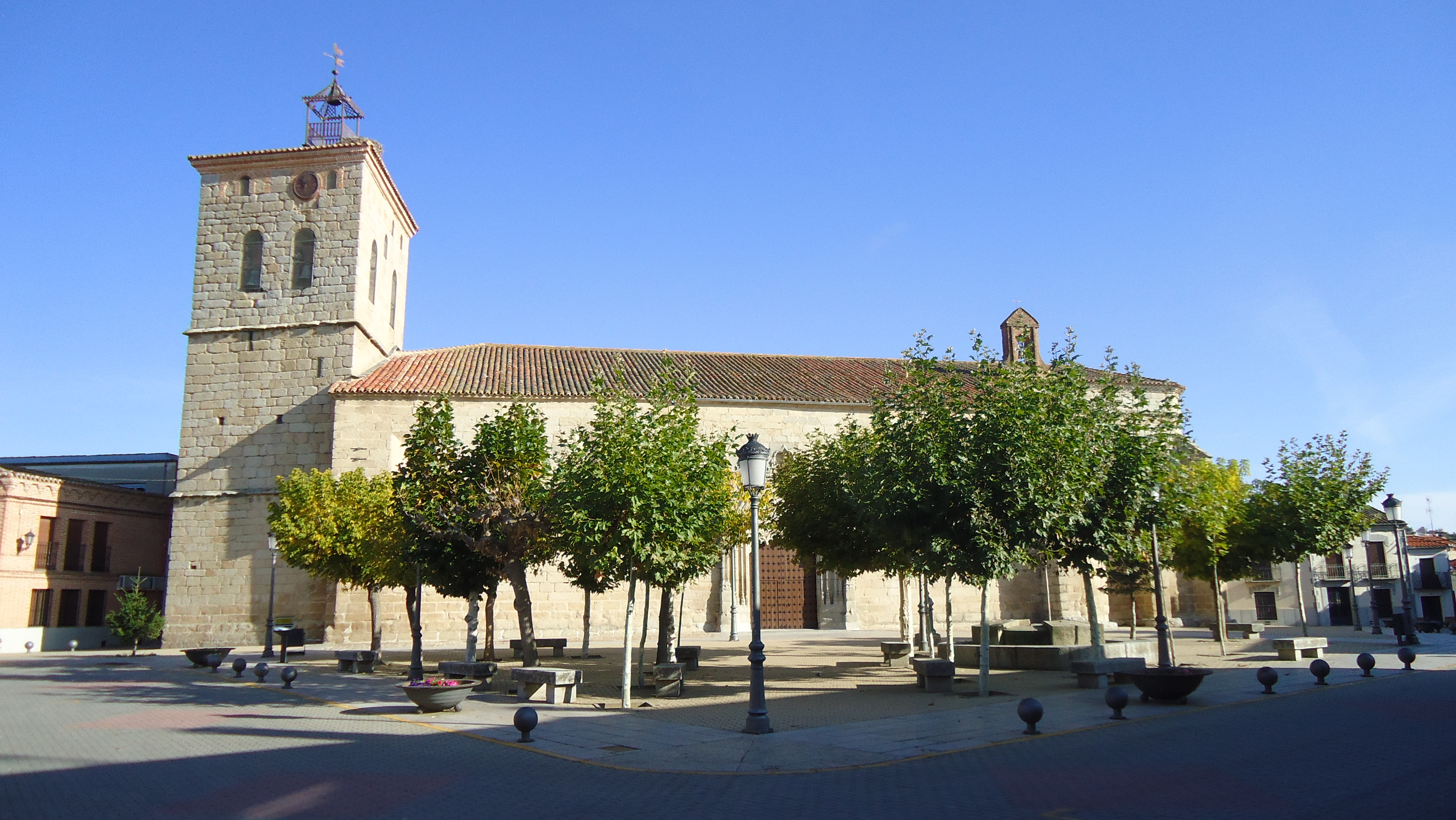 Vista de la Plaza Mayor de Macotera.